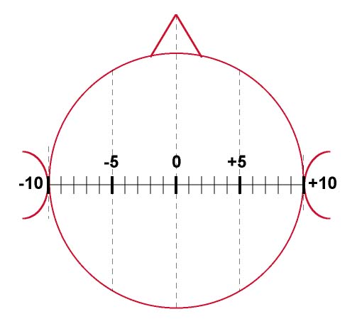 Lateralisationsskala Abbilden von Hörereignissen im Kopf werden auf eine Lateralisationsskala von -10..+10. Hörereignisse, die nicht genau auf der Linie zwischen beiden Ohren entstehen, sondern davor/dahinter bzw. darüber/darunter, sollen hierbei auf die Verbindungslinie zwischen beiden Ohren projiziert werden (gestrichelte Linien).